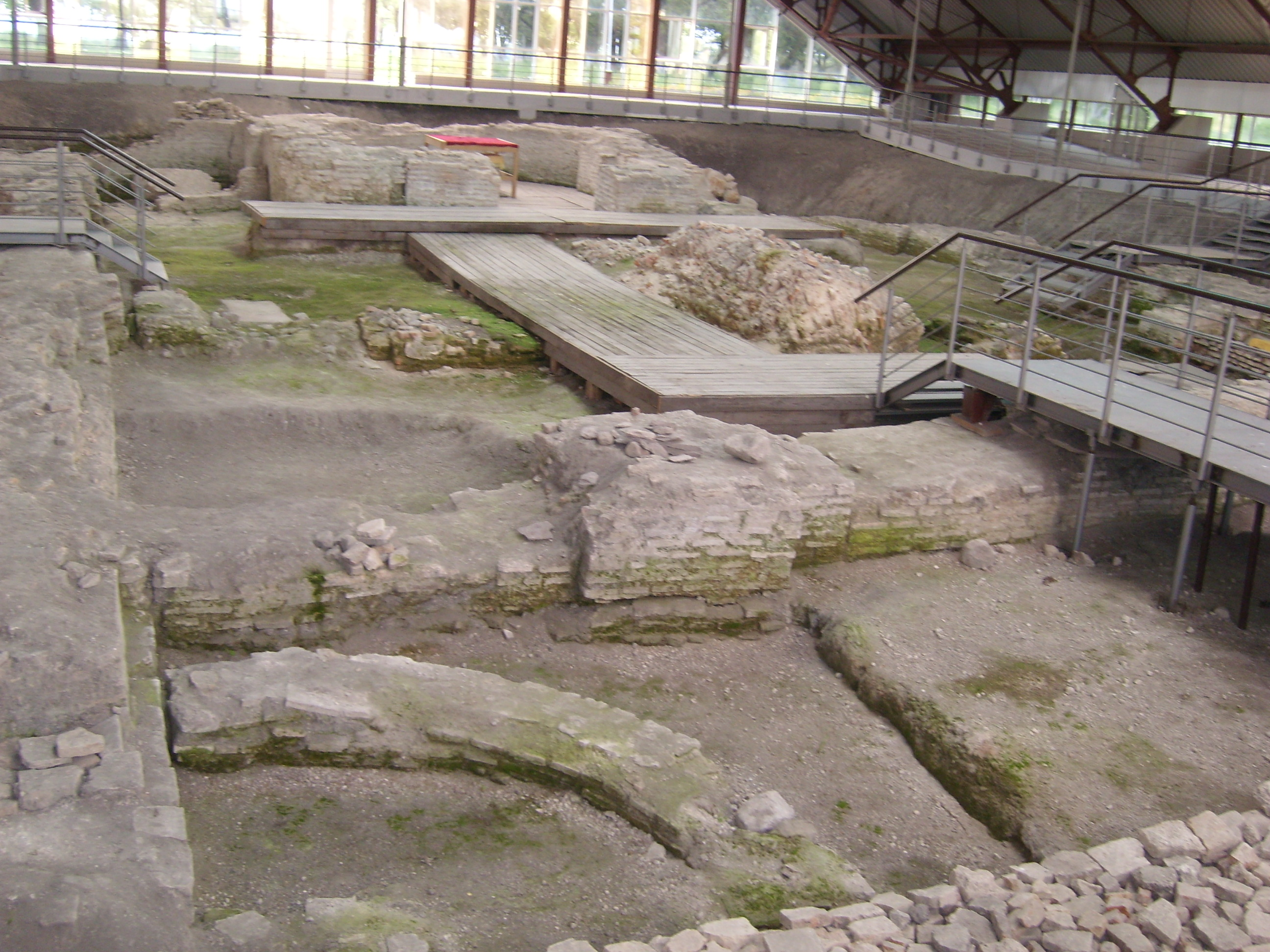 Раннесярэдневяковае гарадзішча старажытнага Турава. г. Тураў Беларуская (тарашкевіца): Гарадзішча старажытнага Турава пэрыяду раньняга сярэднявечча. г. Тураў This is a photo of Belarusian heritage monument. Reference number: 313В000360 ( WLM)